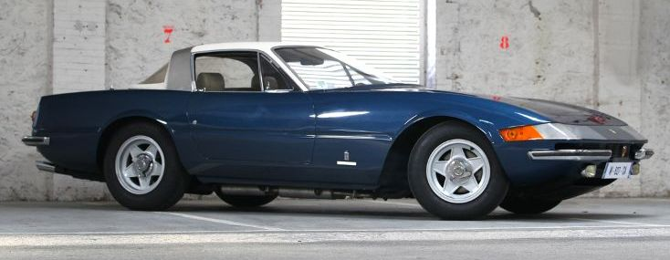 Ferrari 365 GTB/4 Pininfarina Coupé Speciale. Esemplare unico, esposto al Salone di Parigi del 1969, telaio n.12925, motore n.251.